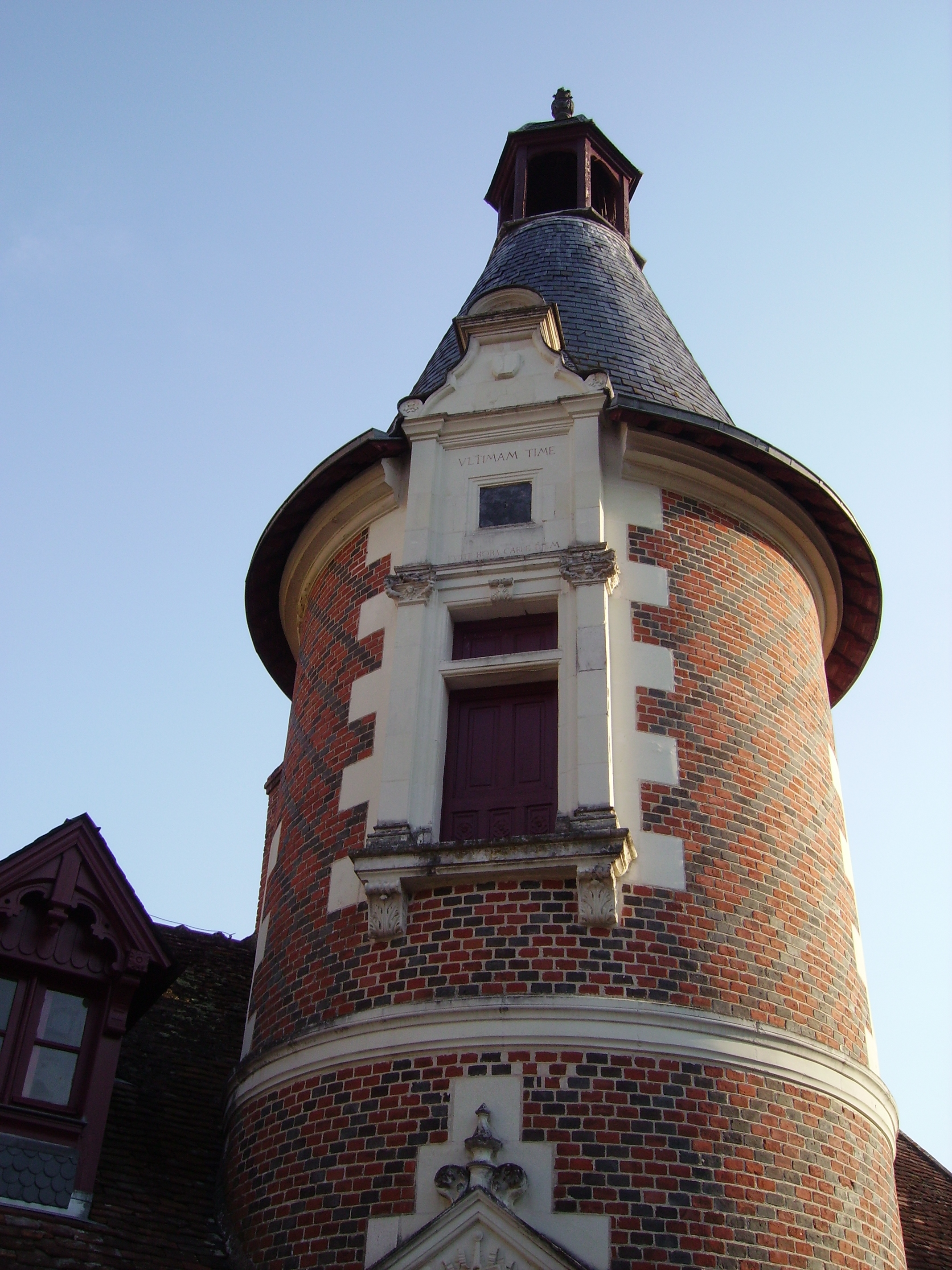 Château of Troussay, France. Sundial on right tower. 17th century. Château de Troussay, France, Loir et Cher. Cadran solaire sur la tour de droite, XVIIe siècle. =